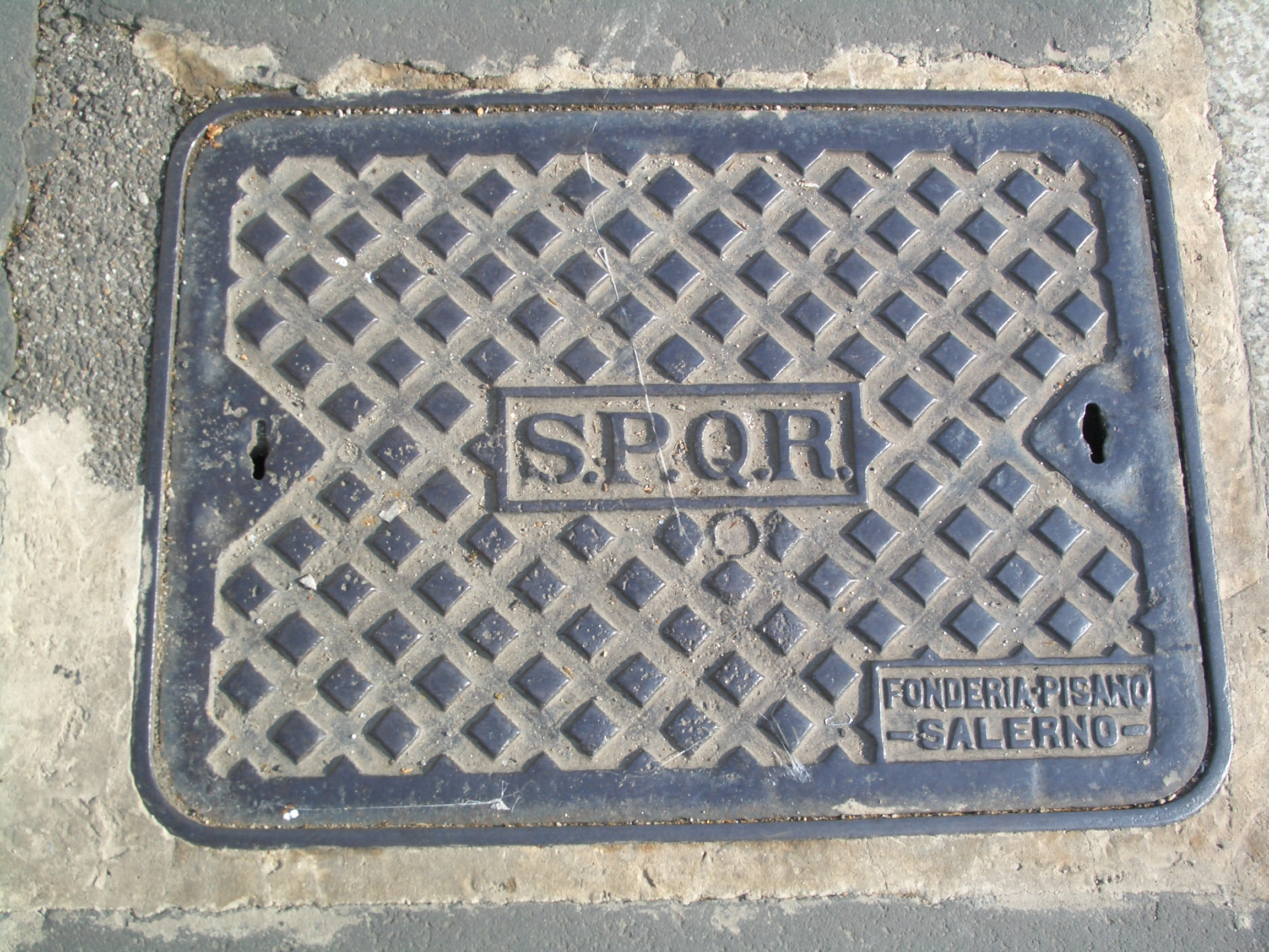 Kanaldeckel in Rom